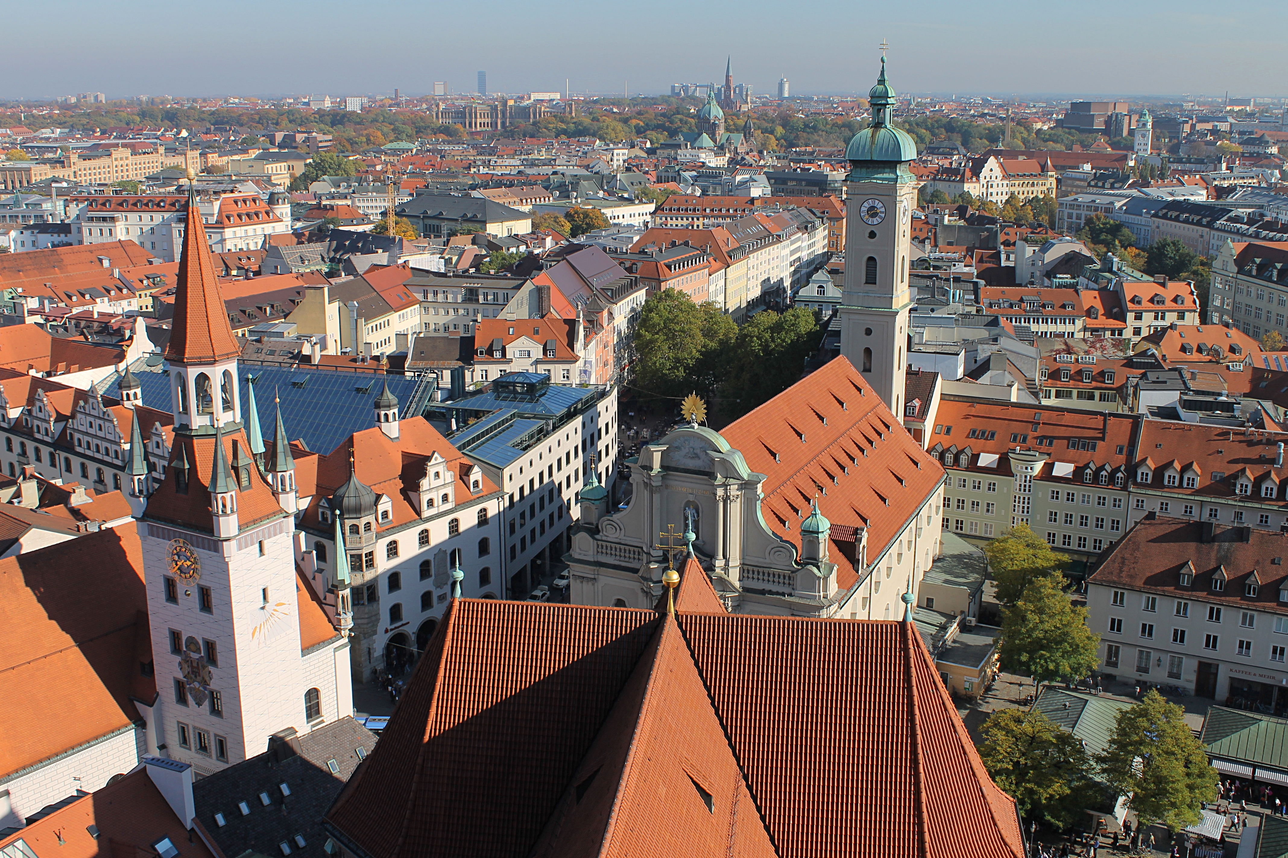 « Munich est lovée entre l’art et la bière comme un village entre deux collines » écrivait Heinrich Heine il y a plus 150 ans. La ville s’entend fort bien à concilier tradition bavaroise et activités frénétiques. Elle est connue internationalement pour ses collections d'art ancien et classique.